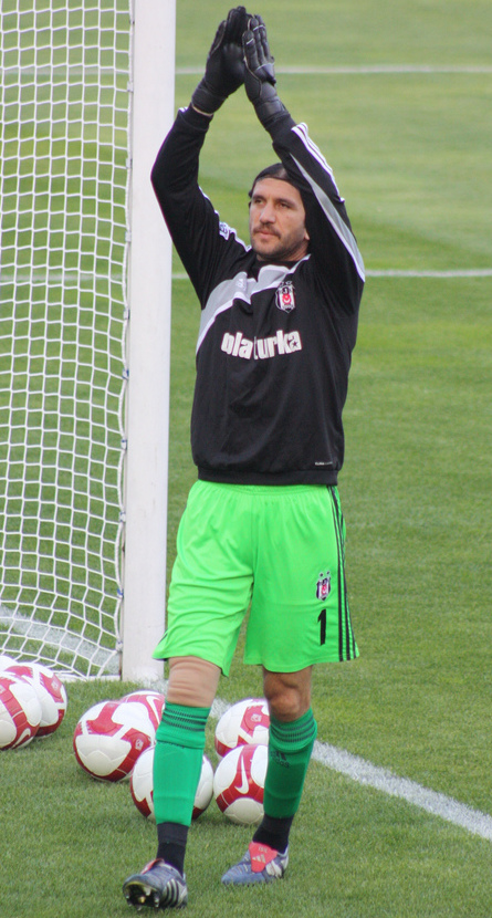 Rüştü Reçber Beşiktaş Formasıyla